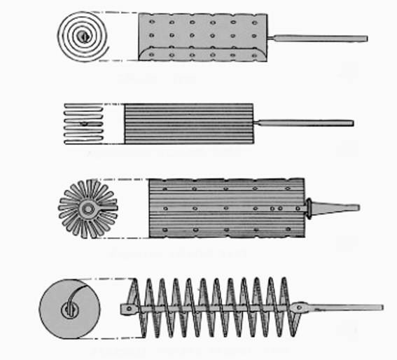 Historische Anodenformen früherer Aluminium-Elektrolytkondensatoren